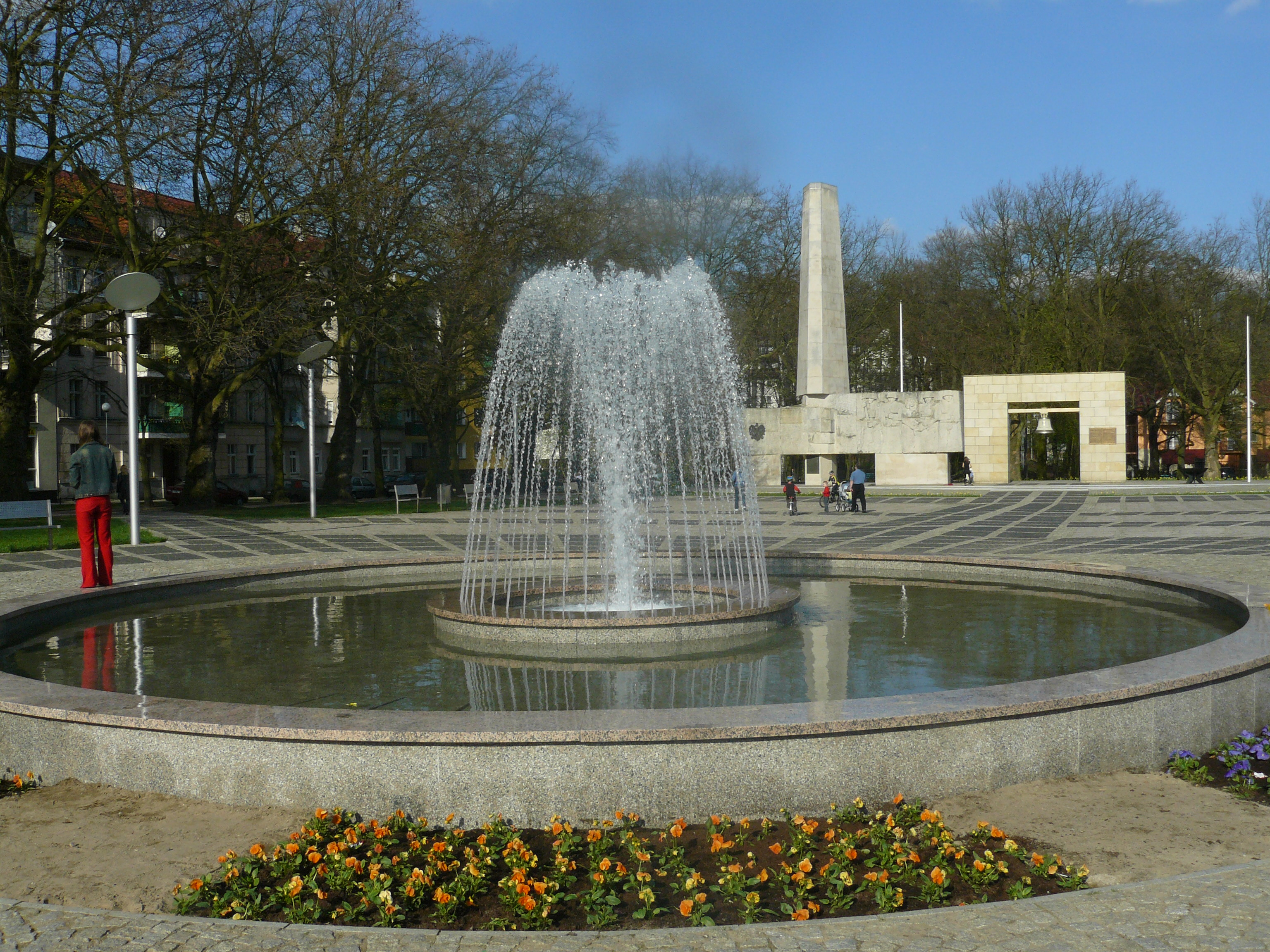 fontanna na placu Grunwaldzkim w Gorzowie